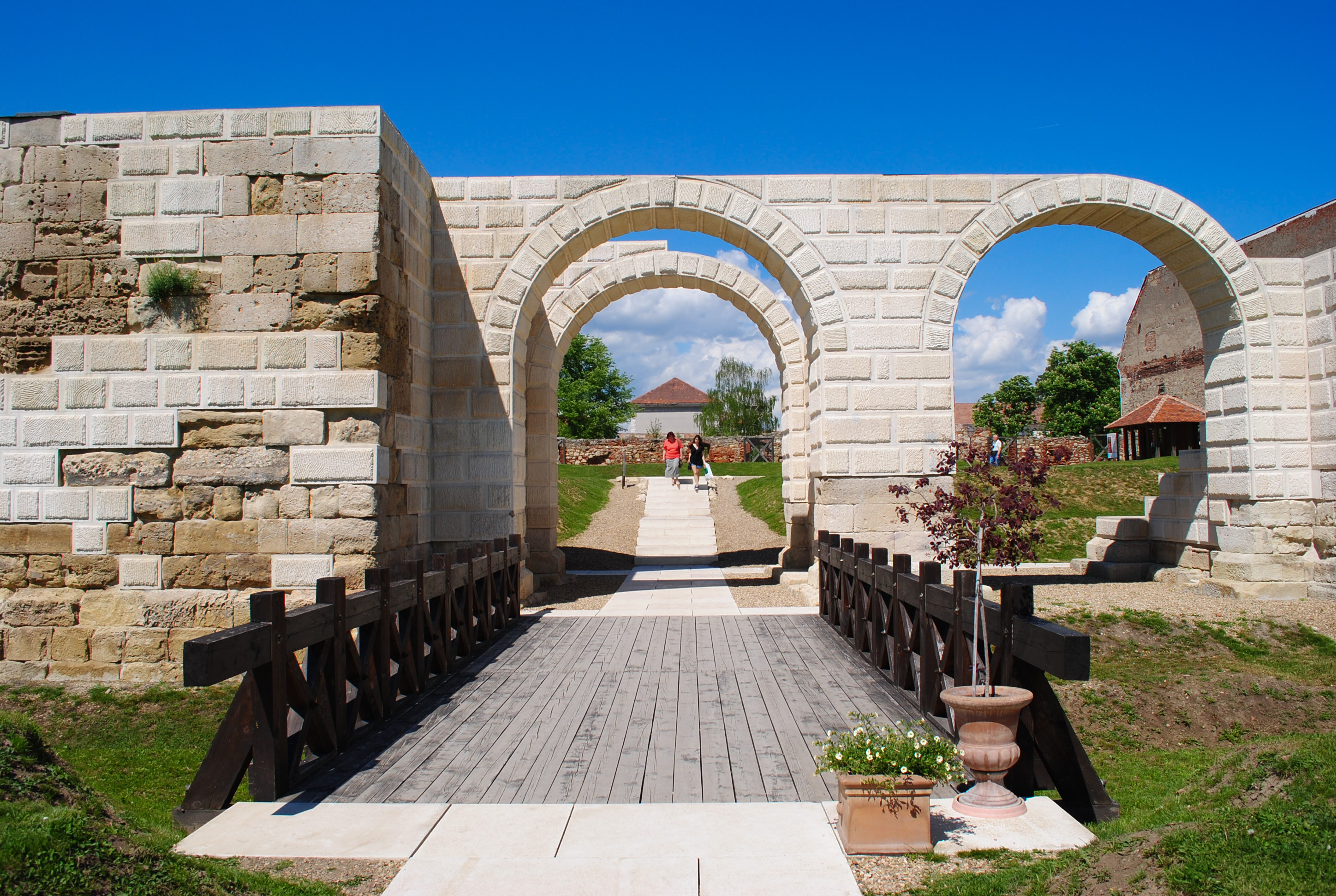 Castrul Legiunii a XIII-a Gemina, sec. II - IV p. Chr 01